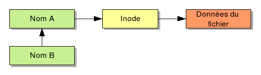 Le concept du « symlink », ou « lien symbolique » dans les systèmes de fichiers Unix